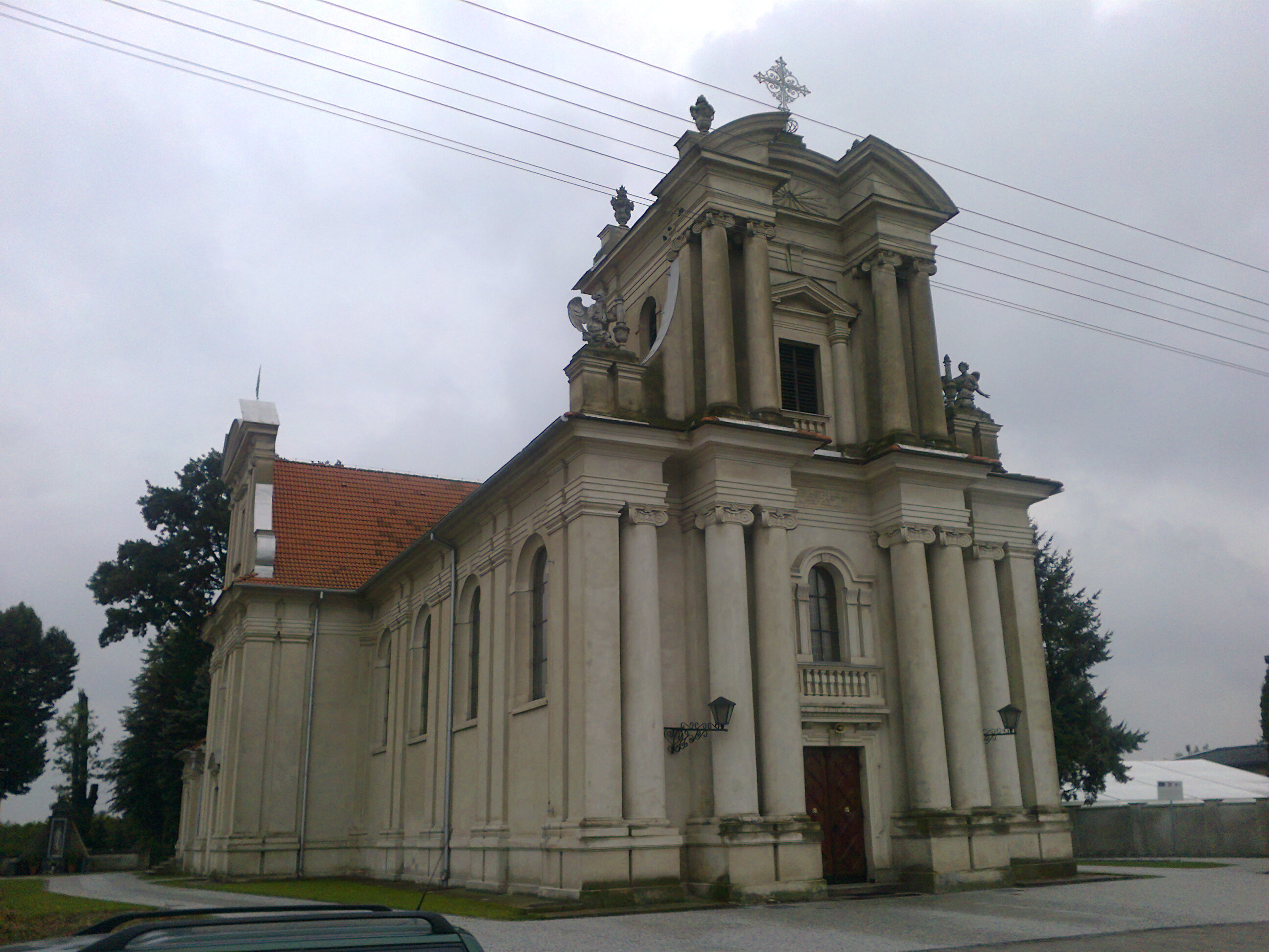 Kościół pw. św. Marcina i św. Stanisława w Rakoniewicach